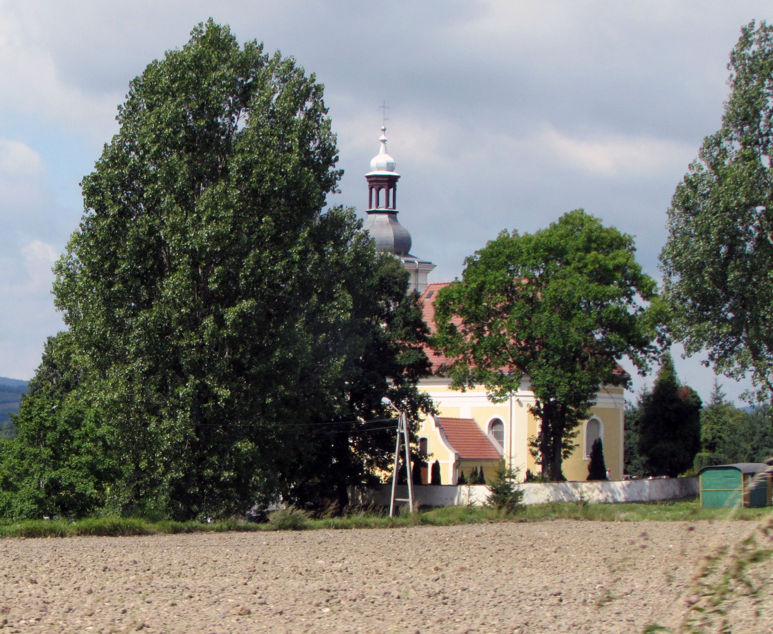 Płonica, kościół fil. p.w. św. Mikołaja, 1777